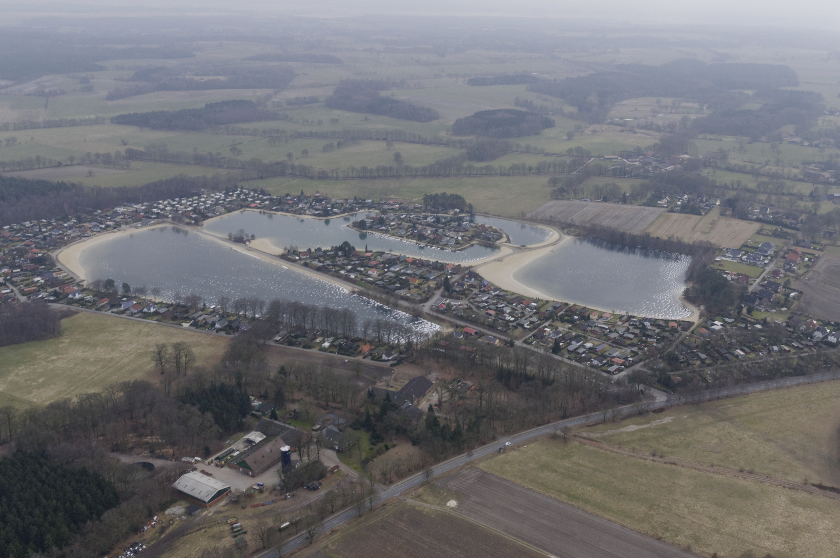 Luftaufnahme, Ohlenstedter Quellseen